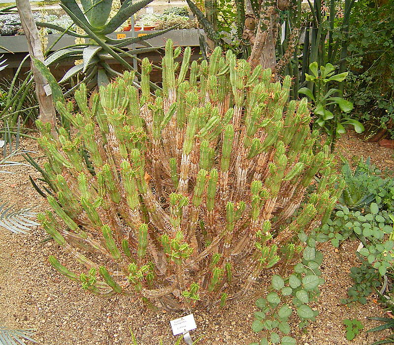 Euphorbia heptagona BG Heidelberg, Germany